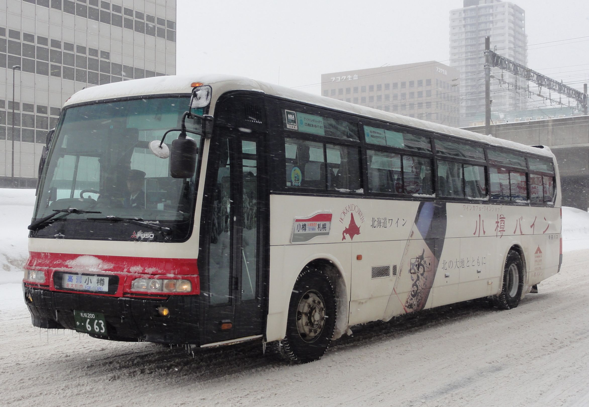 Hokkaido Chuo Bus Sapporo to Otaru Highway Bus 北海道中央バス 高速おたる号 小樽バインラッピング広告